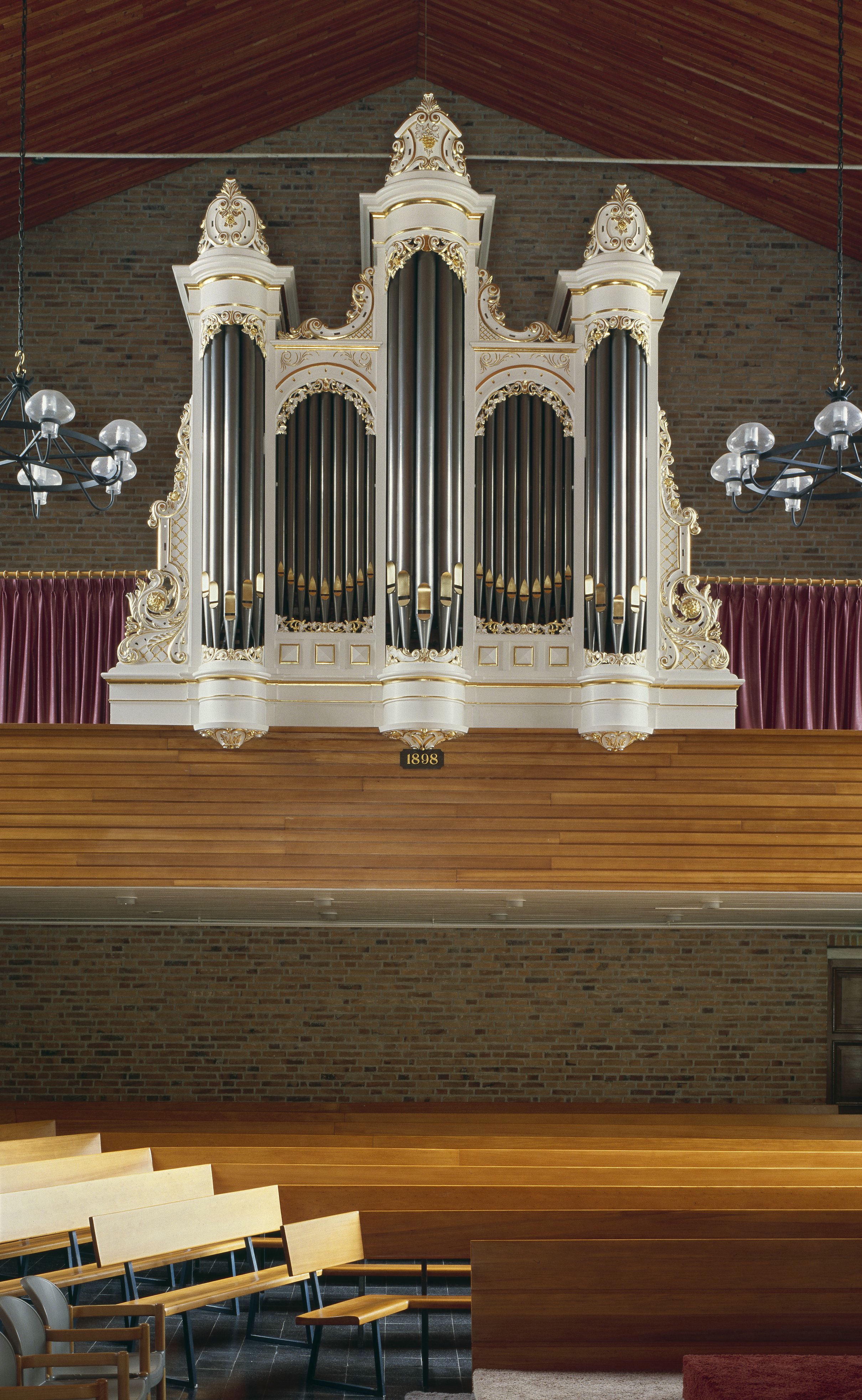 Gereformeerde Kerk: Interieur, aanzicht orgel, orgelnummer 473 (opmerking: Gefotografeerd voor Het Historische Orgel in Nederland 1894-1901, bladzijde 209)